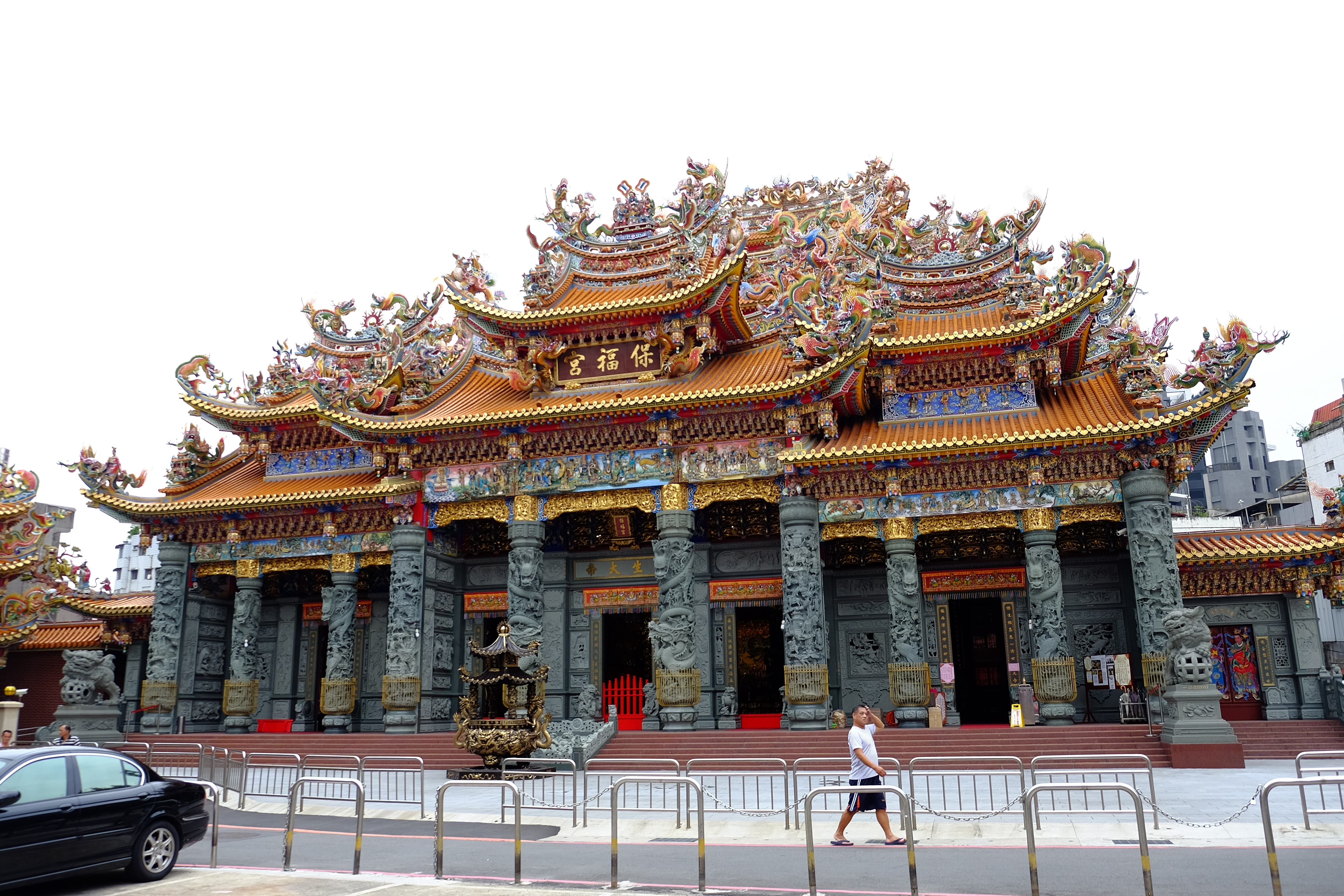 2016年永和保福宮